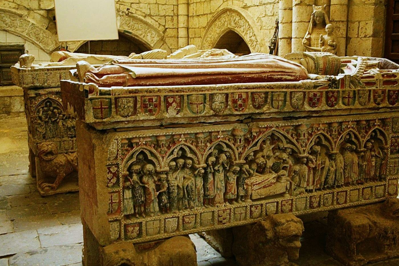 Sepulcros góticos del siglo XIII, correspondientes al infante Felipe de Castilla (1231-1274), hijo del rey Fernando III de Castilla, y a su segunda esposa, Leonor Ruiz de Castro. Se encuentran en la capilla de Santiago de la iglesia de Santa María la Blanca de Villalcázar de Sirga, (Palencia, Castilla y León, España).